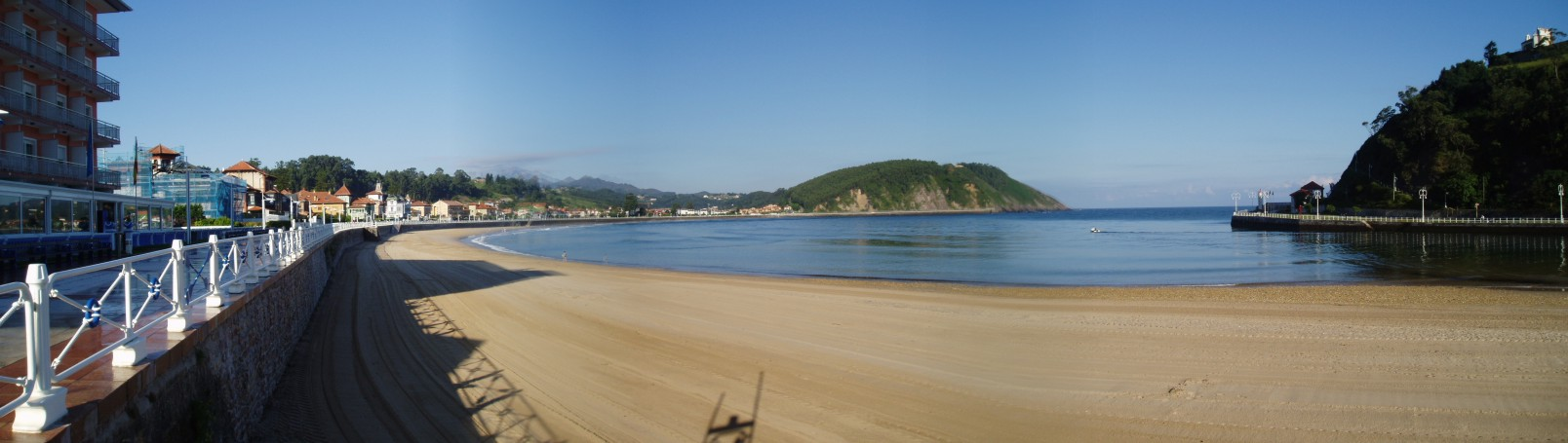 Vista panorámica de la Playa de Sta. Marina (Ribadesella)